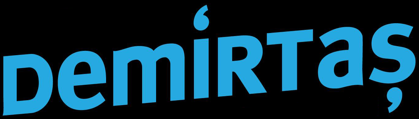 Selahattin Demirtaş'ın 2014 Türkiye cumhurbaşkanlığı seçimi için kullandığı kampanya logosu. Kampanya süresince logonun alt kısmında "yeni yaşam çağrısı" sloganı başta olmak üzere çeşitli sloganlar yer almıştır.